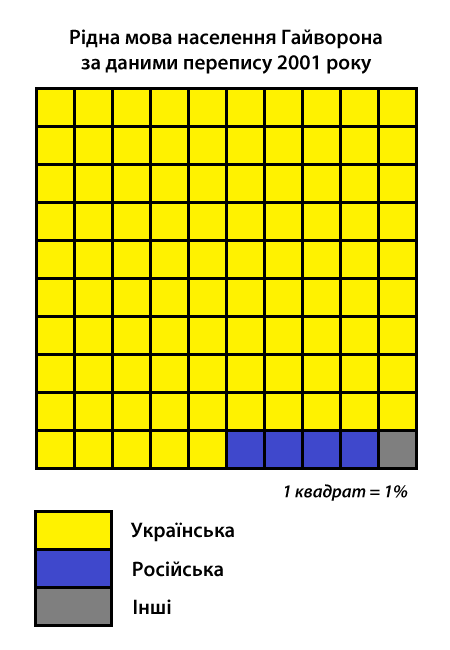 Інфографіка розподілу населення міста Гайворон за рідною мовою згідно з даними перепису 2001 року. Джерело: Розподіл населення Кіровоградської області за рідною мовою (у % до загальної чисельності населення) за переписом 2001 року